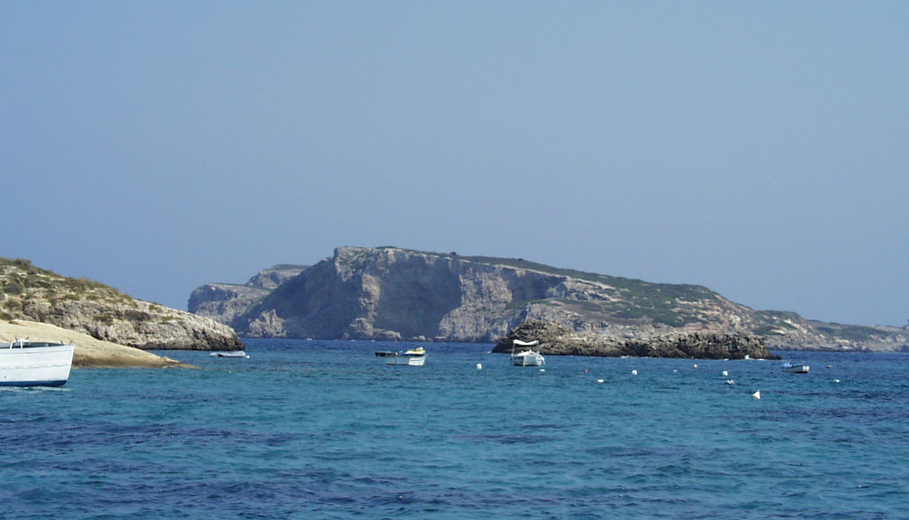 Die Insel Capraia der Inselgruppe Tremiti